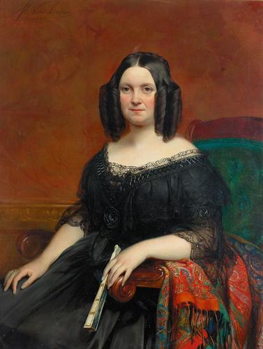 Porträt einer Dame in schwarzem Spitzenkleid